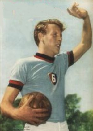 Federico Sacchi en Newell's Old Boys (1959).